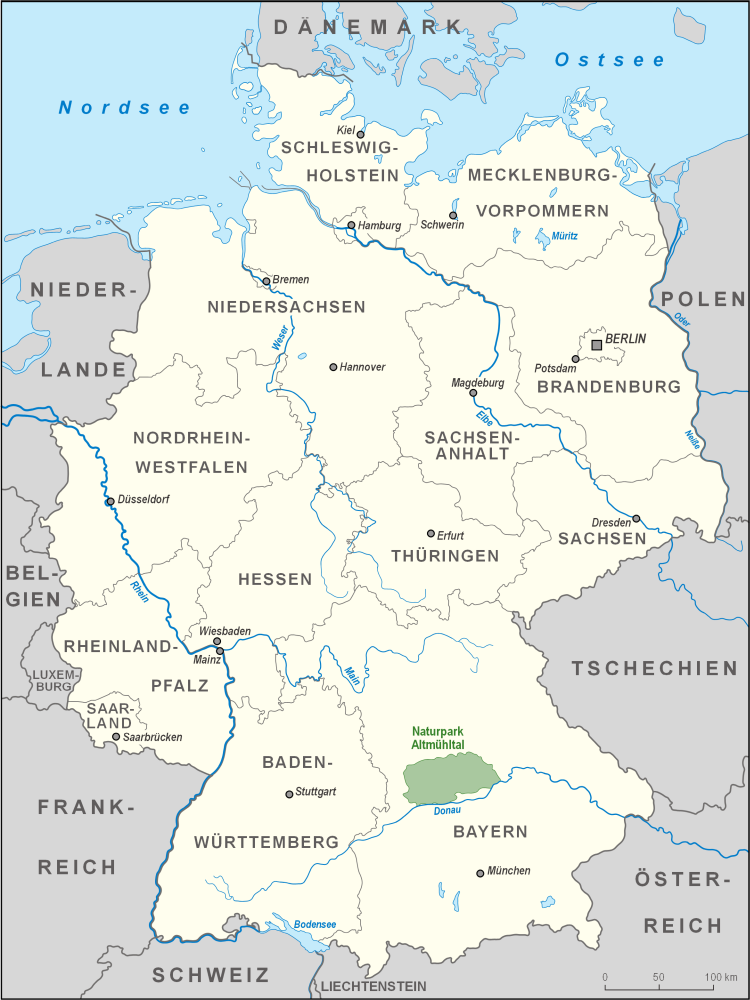 Karte des Naturparks Altmühltal in Deutschland